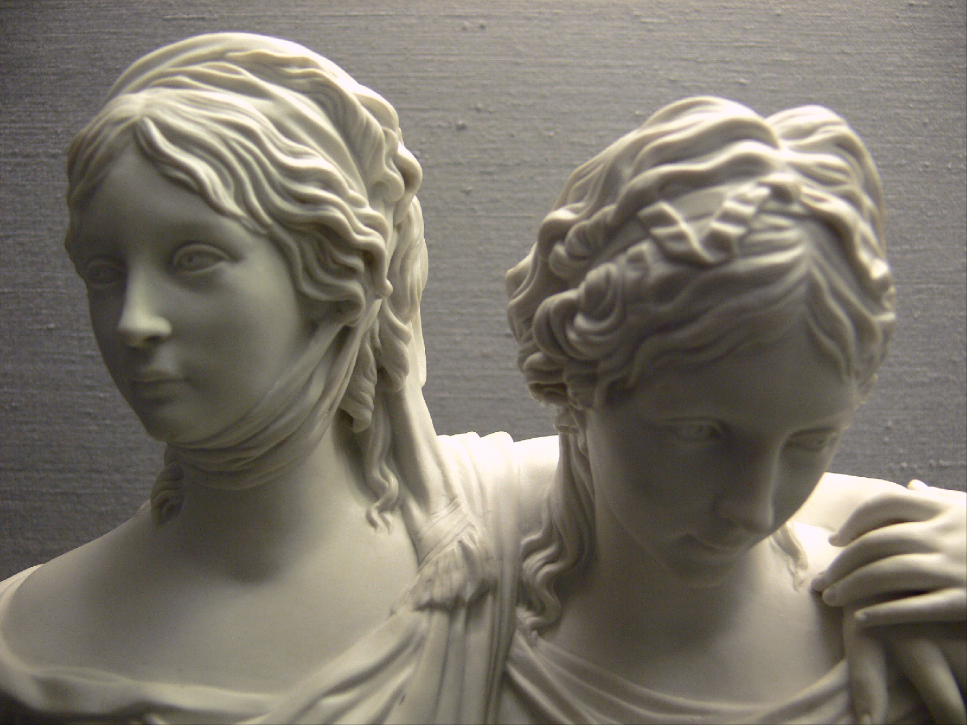 Prinzessinnengruppe nach Schadow, Biskuitporzellan, Königliche Porzellan-Manufaktur Berlin, 1796, Detail: Köpfe Kunstgewerbemuseum Berlin, Inv. Nr. 09, 113